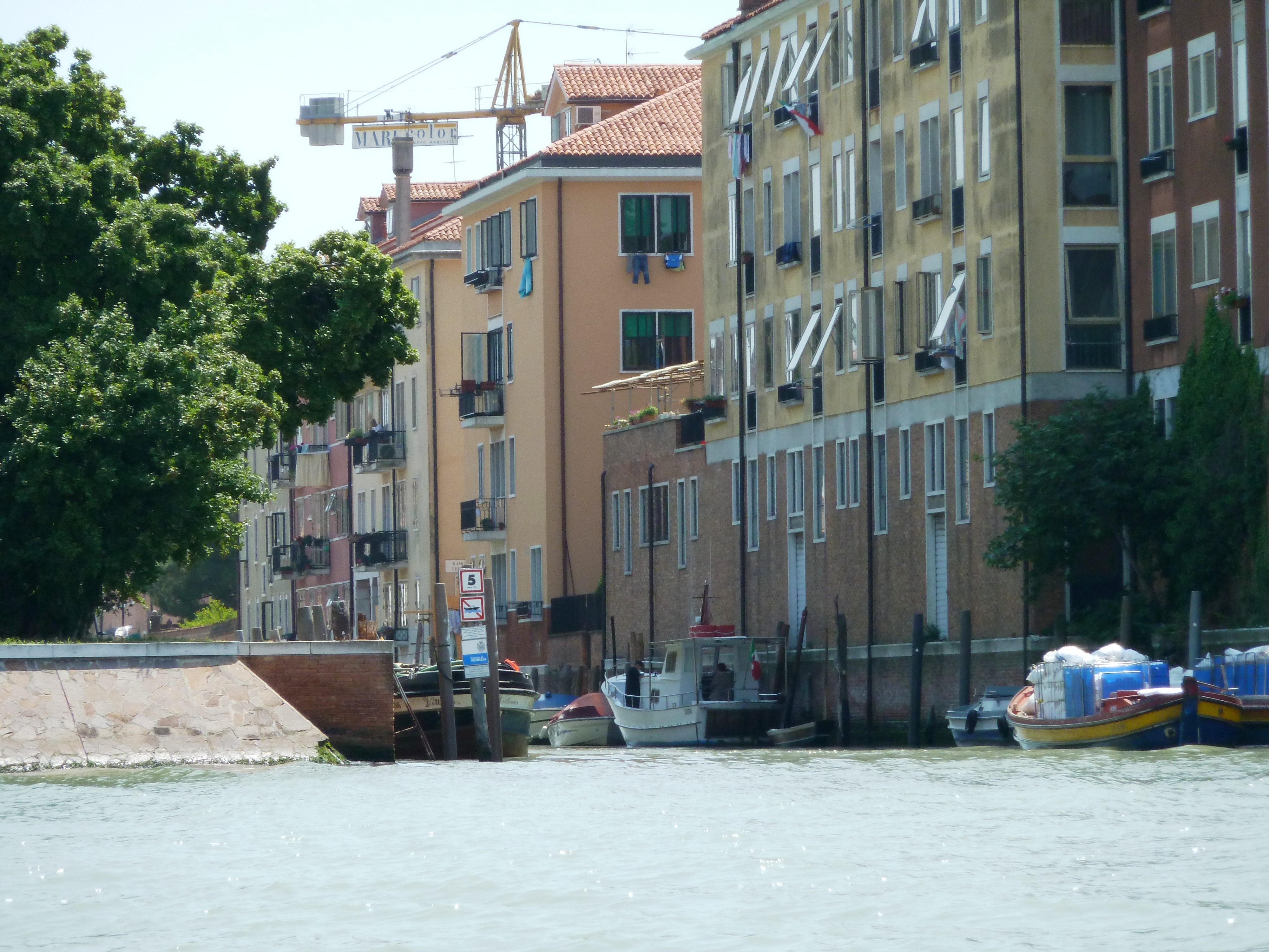 Rio di S. Alvise (Venice)